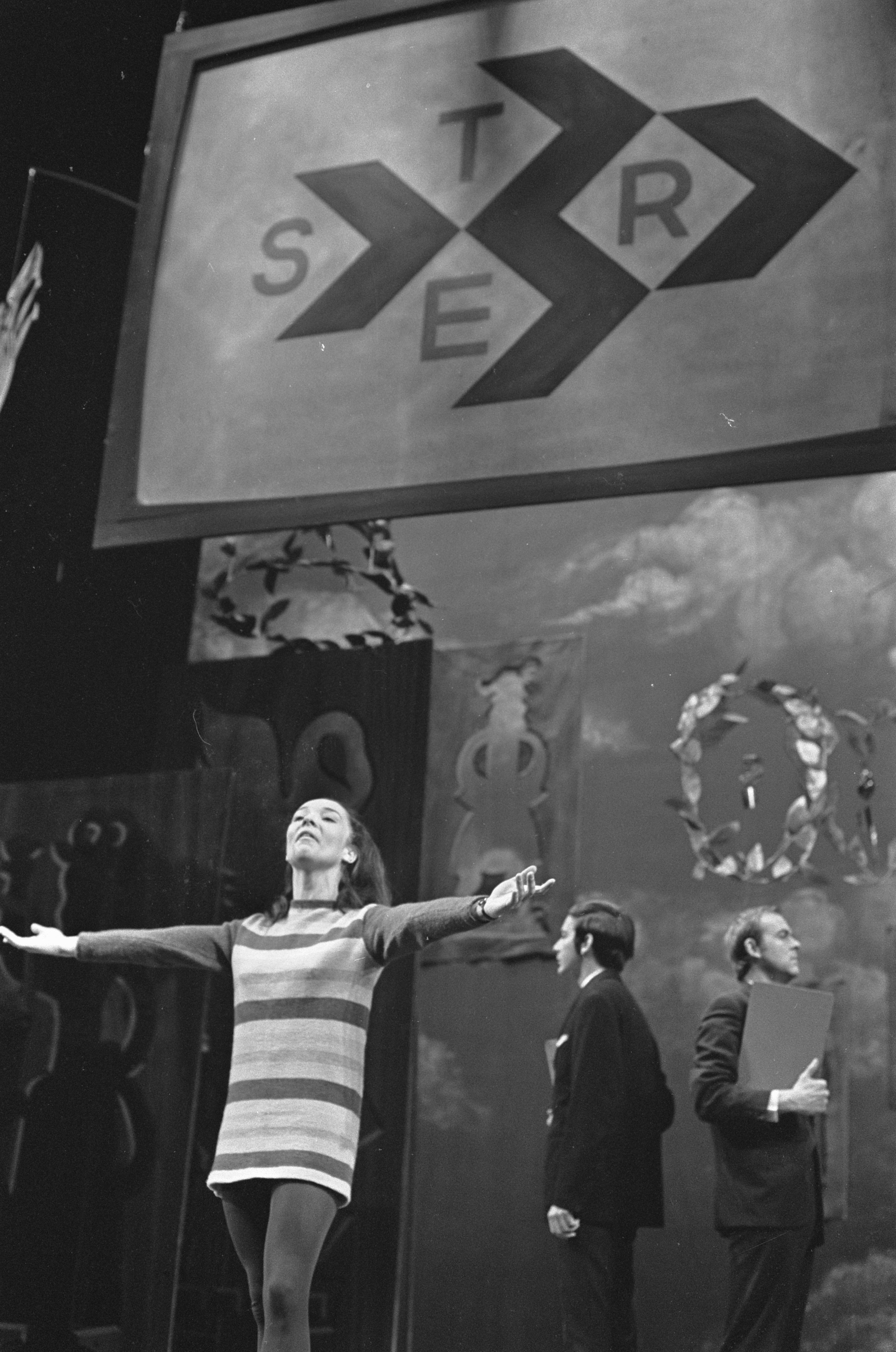 Collectie / Archief : Fotocollectie Anefo Reportage / Serie : [ onbekend ] Beschrijving : Thomasvaer en Pieternel in Stadsschouwburg. Sketch [bovenin logo STER] Datum : 1 januari 1968 Locatie : Amsterdam, Noord-Holland Trefwoorden : acteurs, actrices, jaarwisselingen, toneel Instellingsnaam : Thomasvaer en Pieternel Fotograaf : Nijs, Jac. de / Anefo Auteursrechthebbende : Nationaal Archief Materiaalsoort : Negatief (zwart/wit) Nummer archiefinventaris : bekijk toegang 2.24.01.05 Bestanddeelnummer : 920-9564